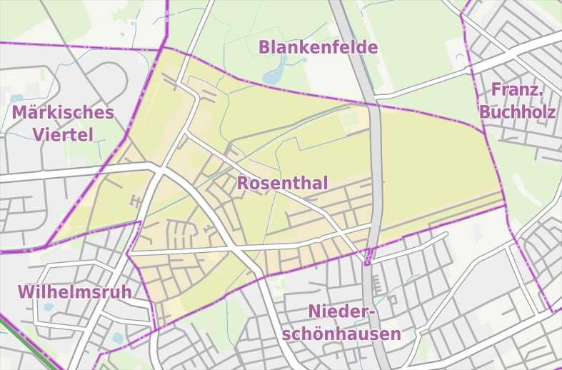 Übersichtskarte der Straßen und Ortslagen in Berlin-Rosenthal